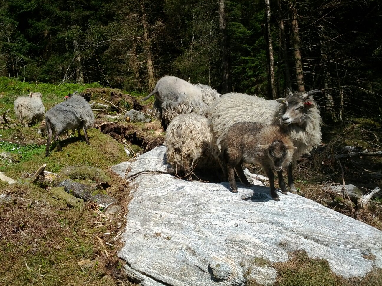 Villsau med lam på Bjåstad